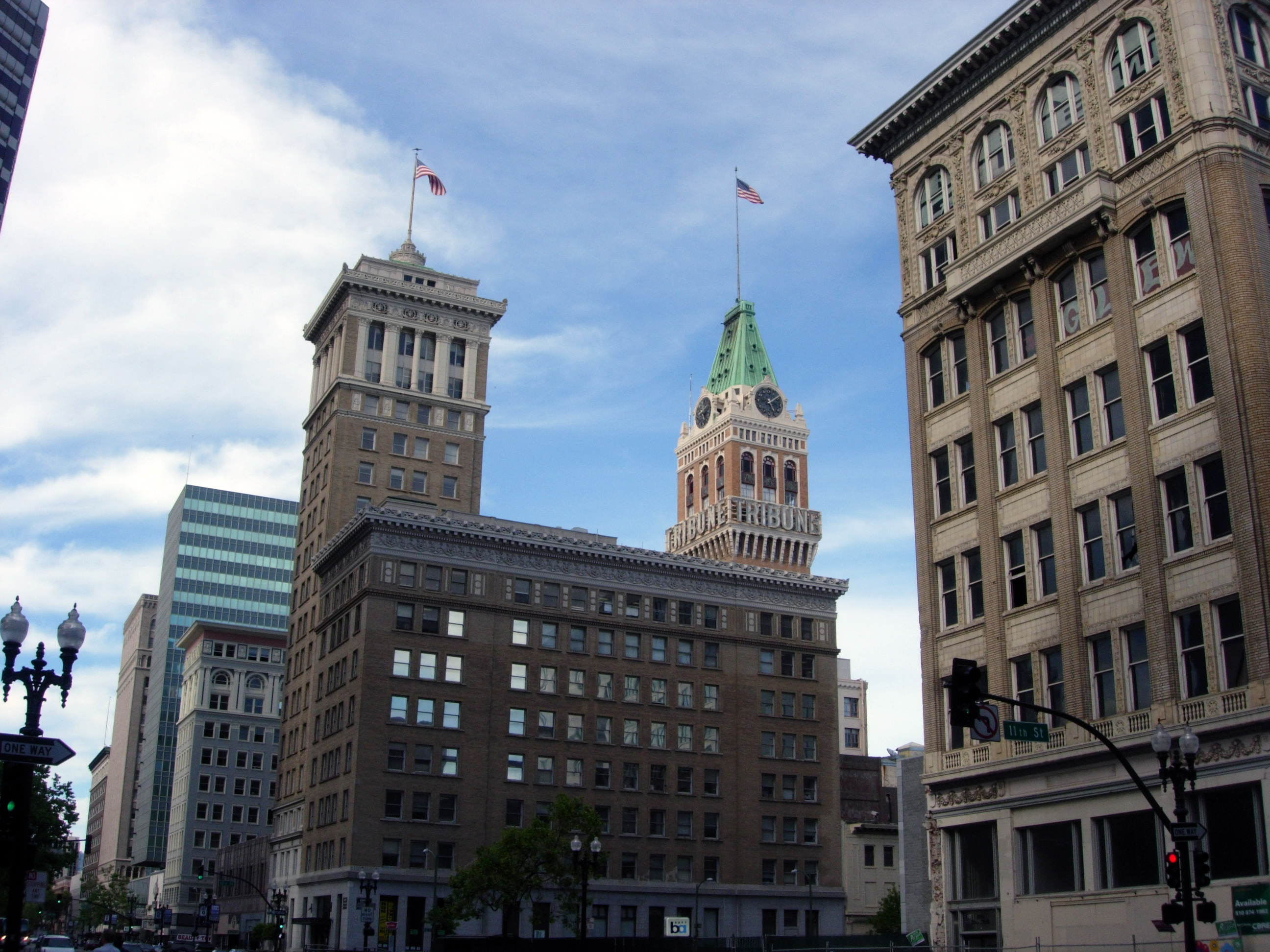 Buildings, Oakland